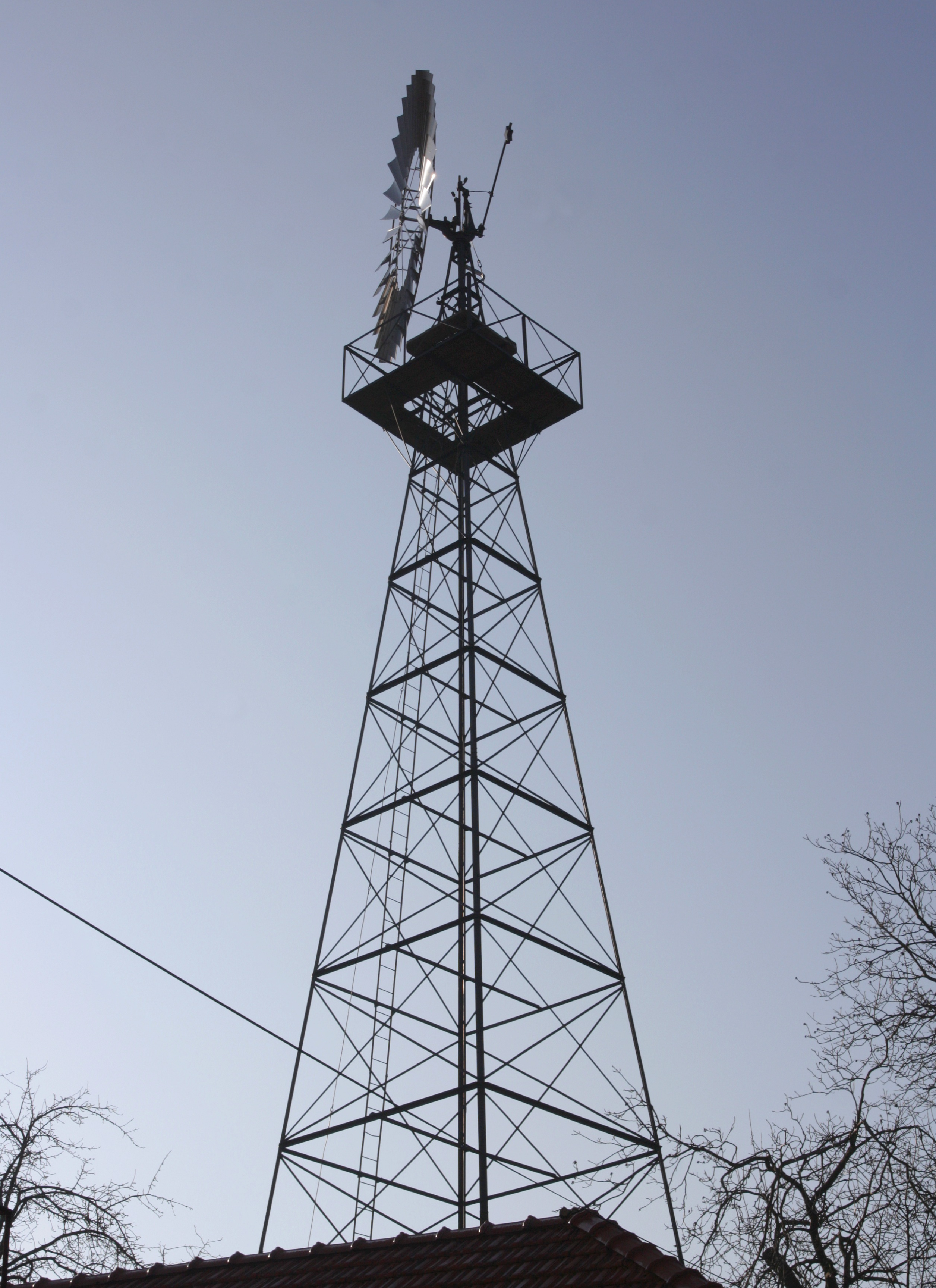 Vedrovice - větrné čerpadlo z let 1912–1914. Vyřazeno z provozu 1958. Větrné kolo a stožár konzervovány v 80. letech, roku 2008 proběhla celková rekonstrukce.